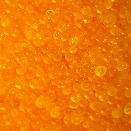 Silica Gel orange